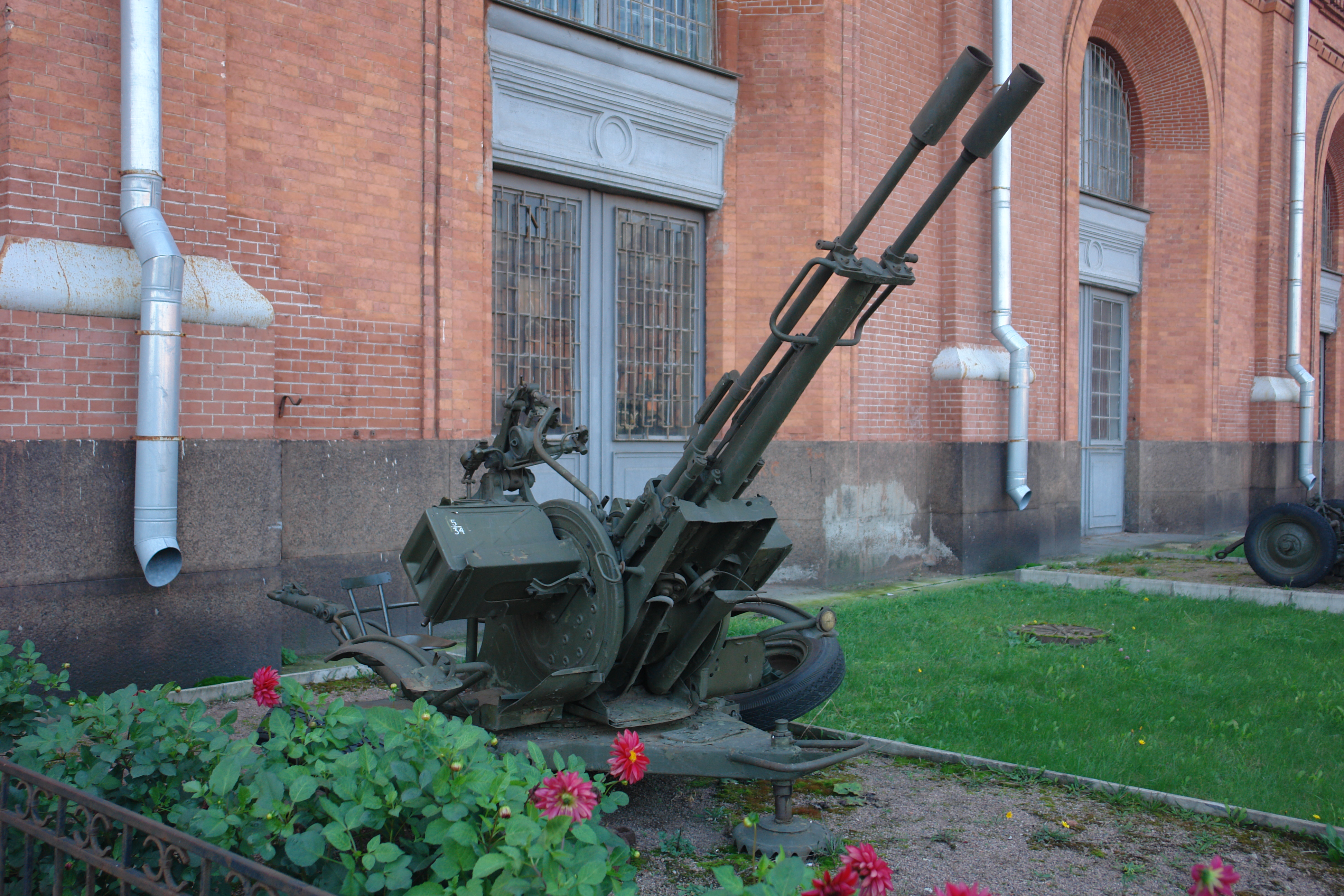 23-мм спаренная зенитная установка ЗУ-23. Поступила на вооружение в 1970-х гг. Досягаемость стрельбы, м: по высоте - 1500, по дальности - 2500. Скорострельность - 2000 выстр/мин. Масса, кг: установки - 900, снаряда - 0,19. Расчет - 5 человек. Военно-исторический музей артиллерии, инженерных войск и войск связи, Санкт-Петербург.